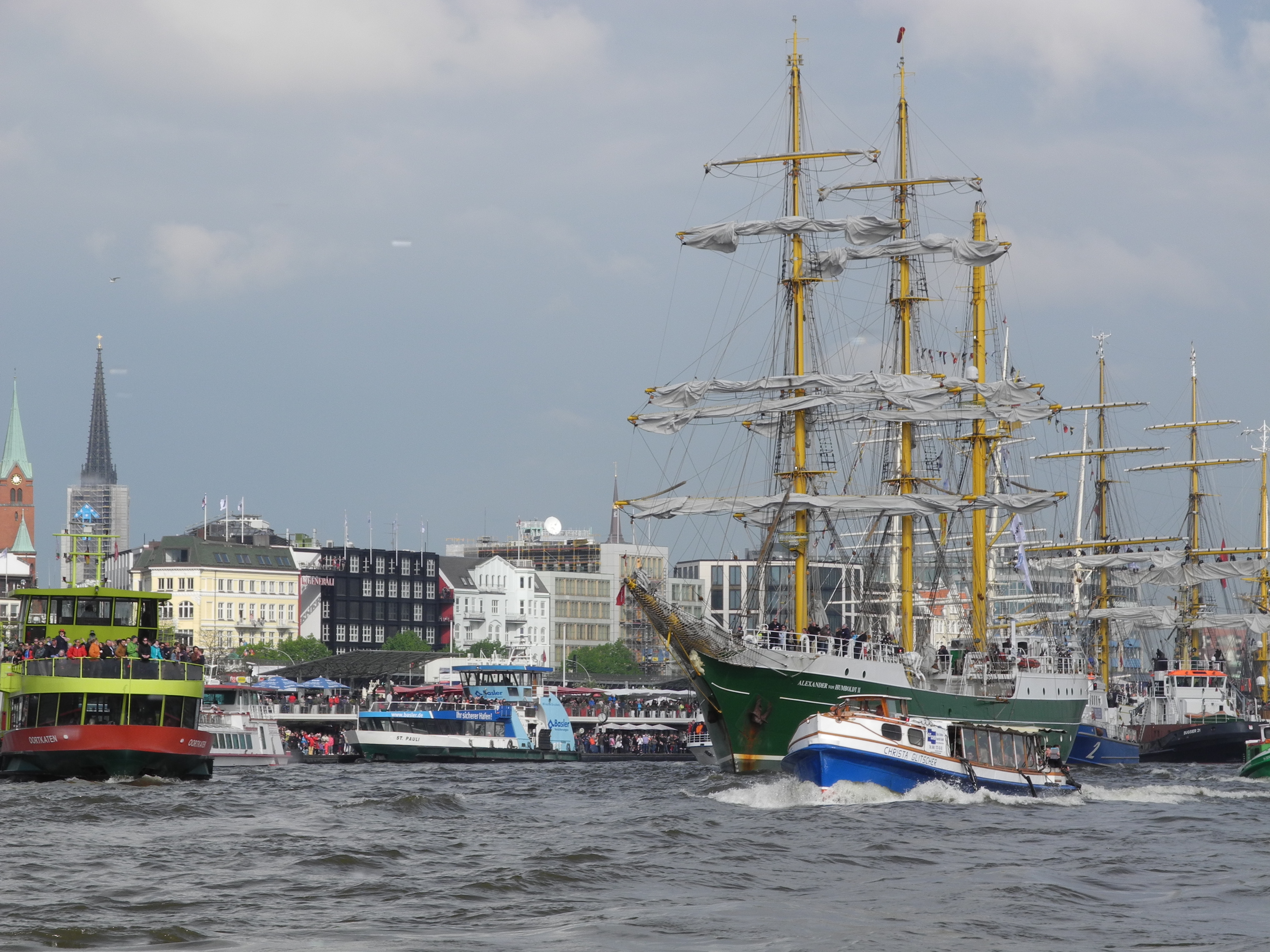 3-Master Hamburg Hafen